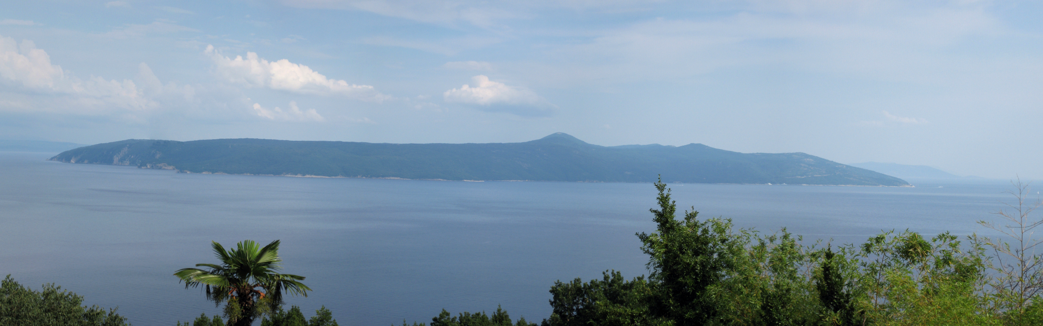 Cres, pogled iz Mošćenica